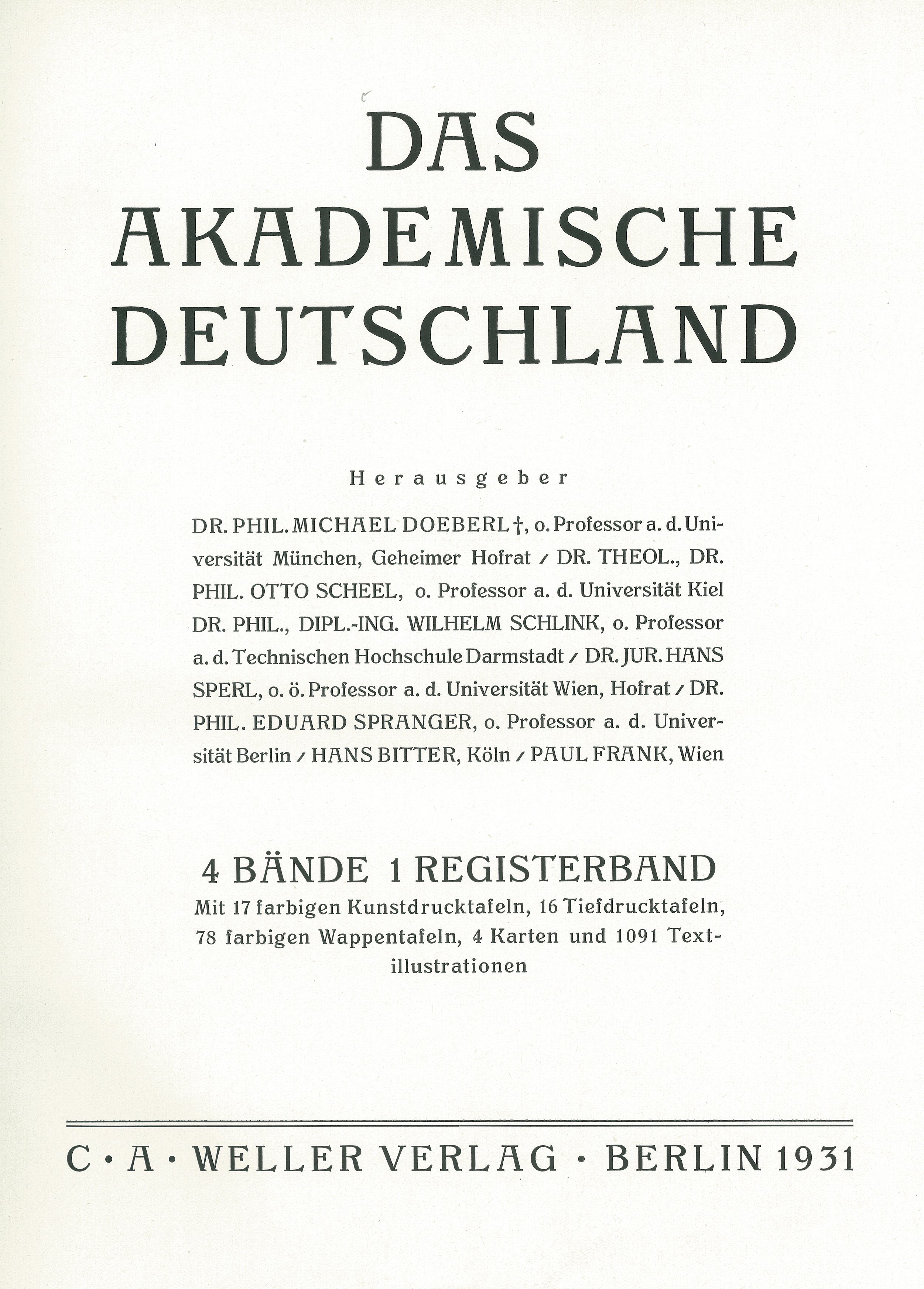 Schmutztitel von Bd. 4 (Wappen)